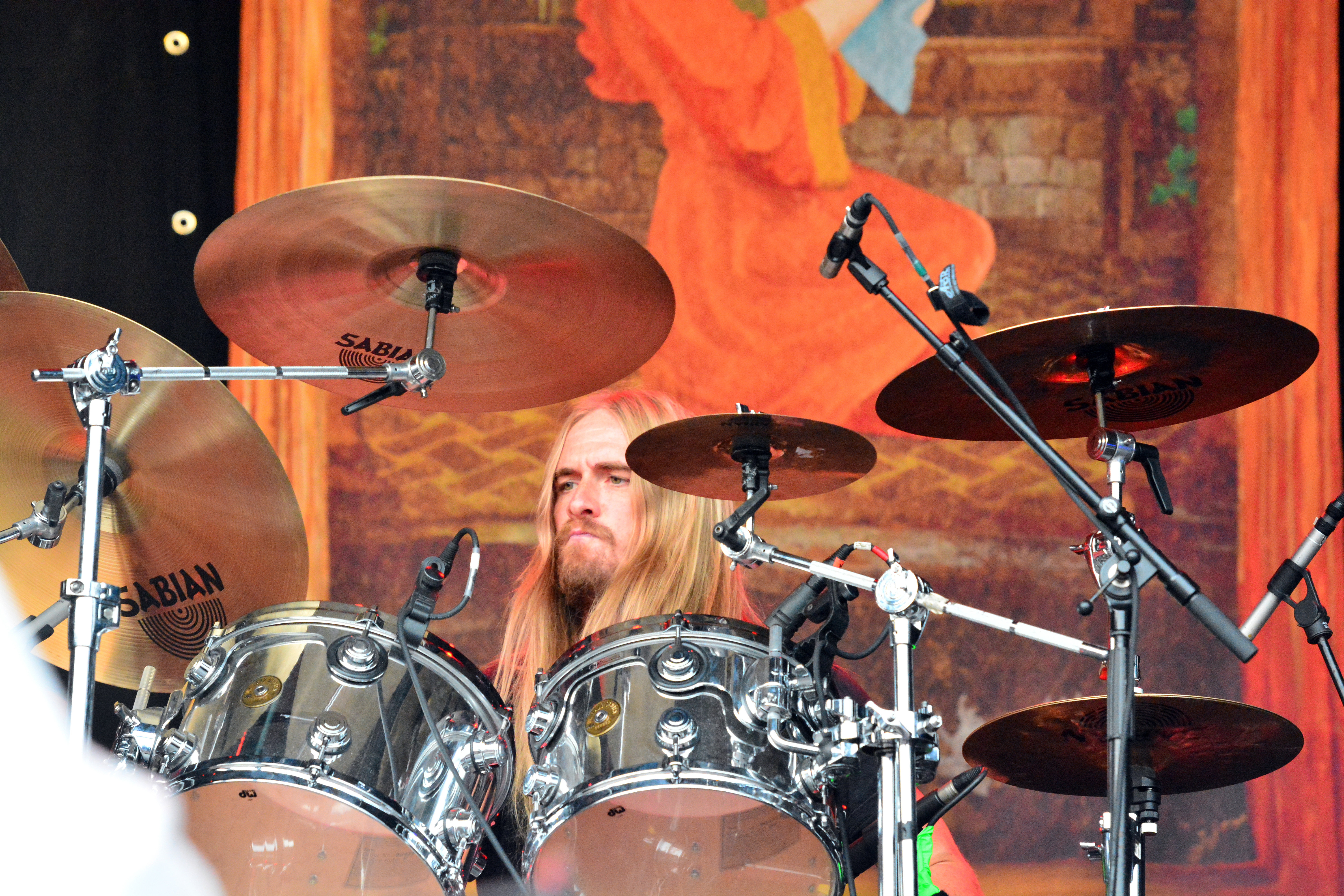 Opeth beim „Elbriot 2015“